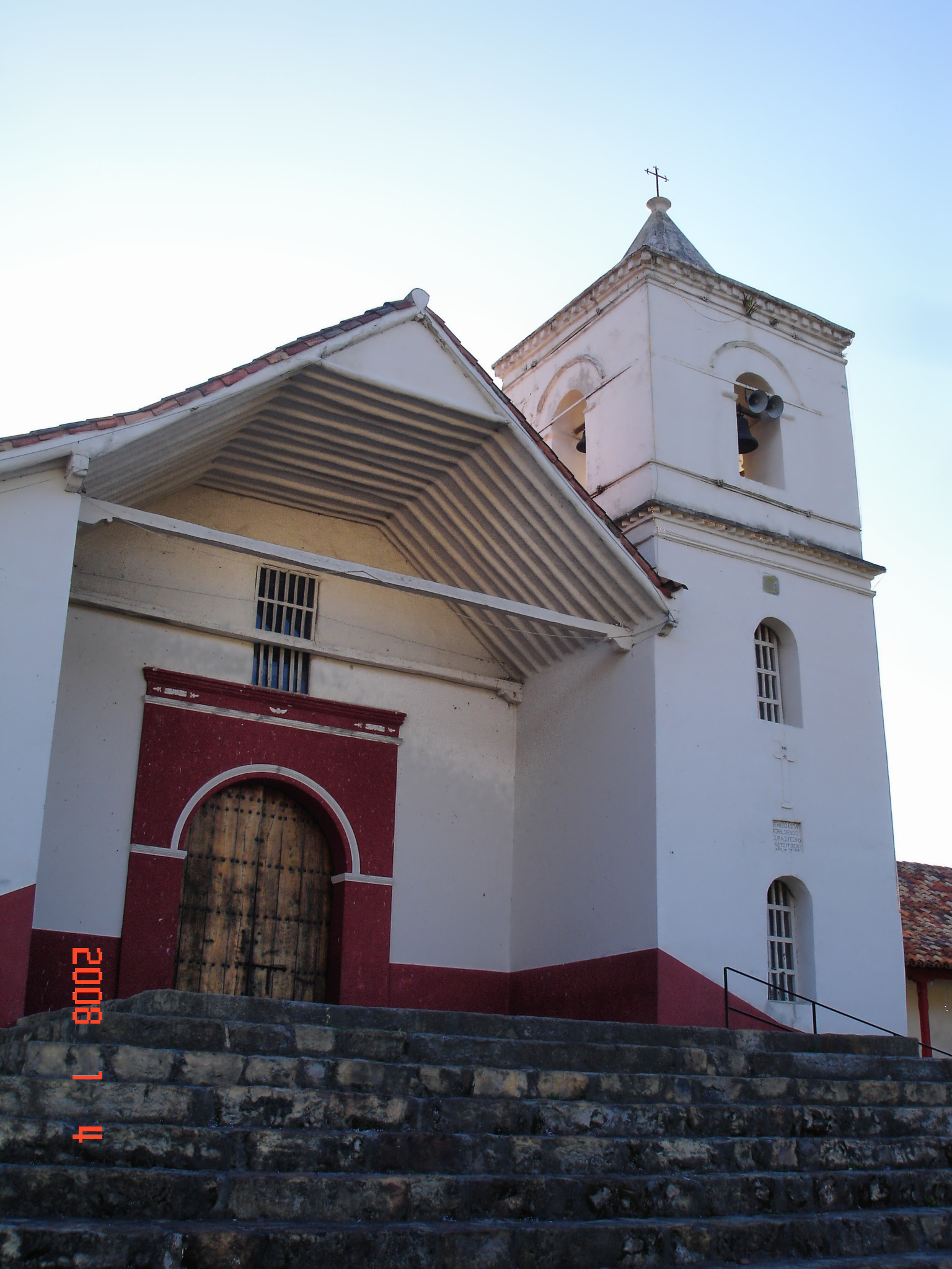 Iglesia Doctrinera, Plaza y Capillas Posas